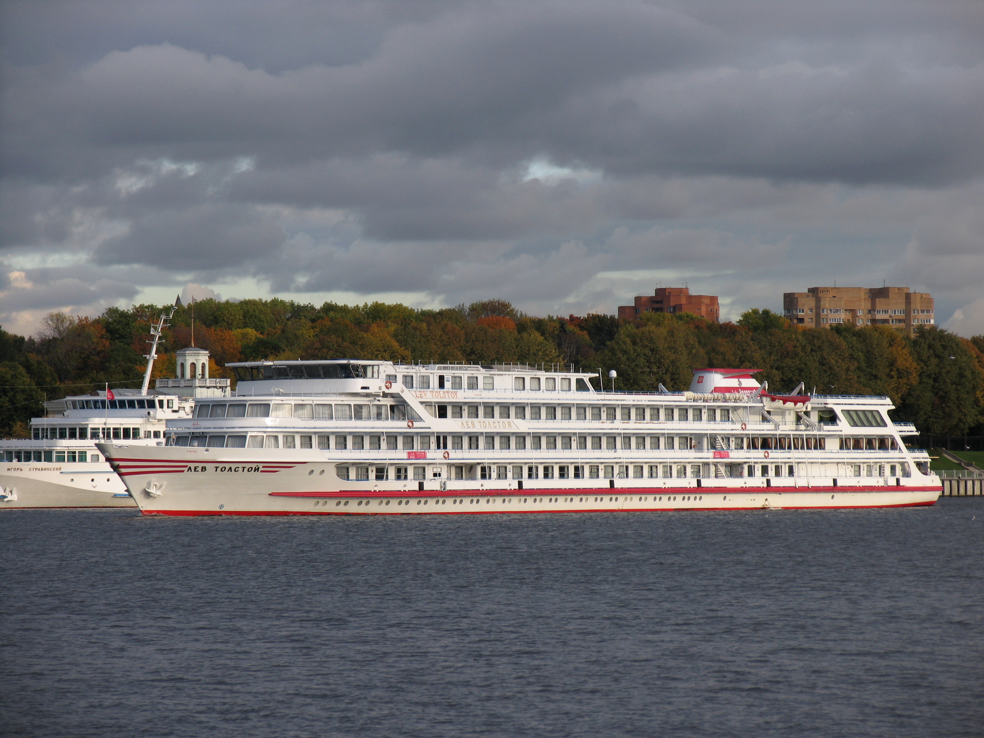 Речной круизный теплоход "Лев Толстой" на Химкинском водохранилище.